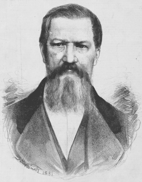 Petr Faster (1801 - 1868) - český vlastenec, místopředseda Svatováclavského výboru a člen Národního výboru v revolučním roce 1848. Portréty osobností od Jana Vilímka